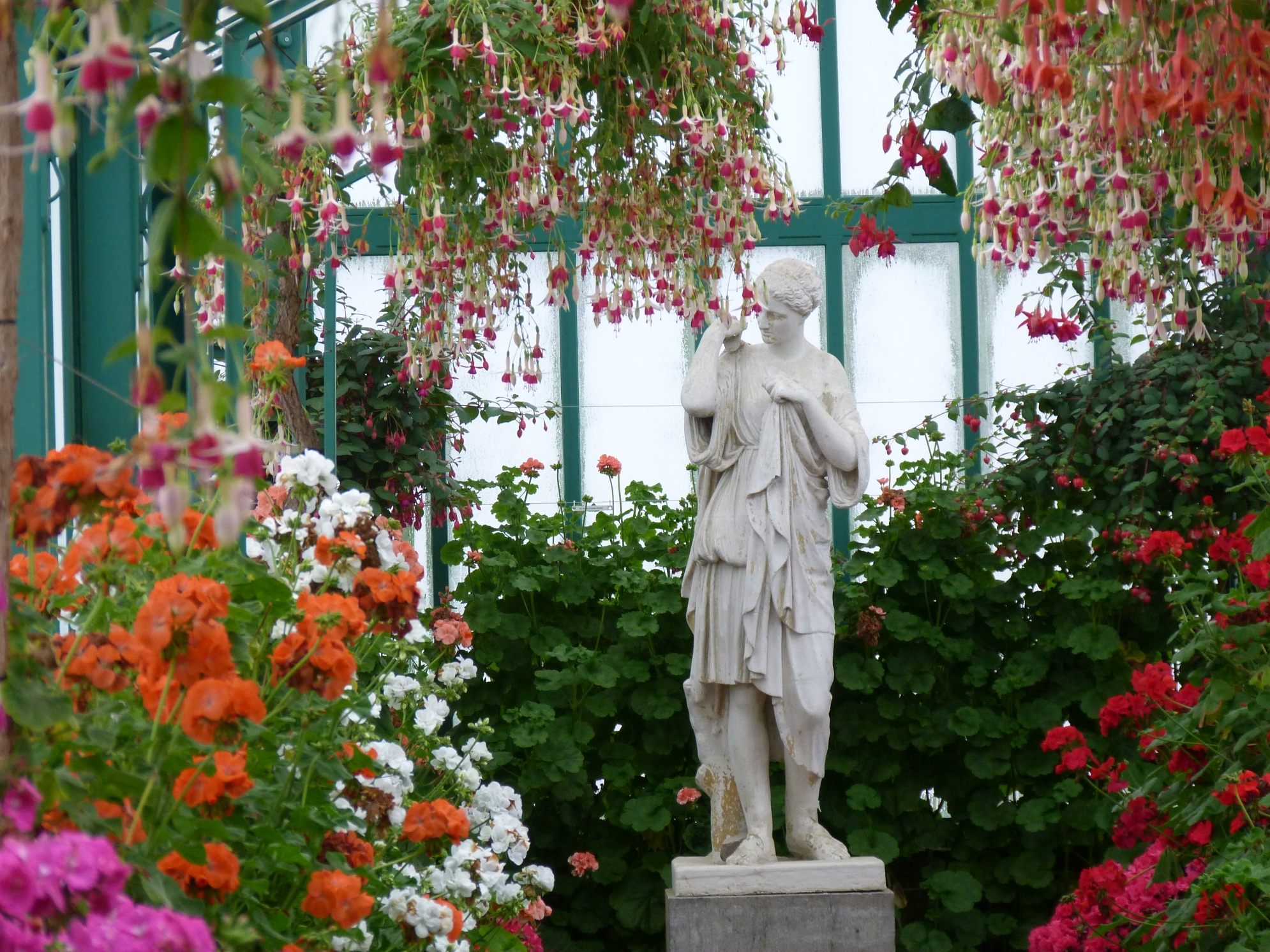 Koninklijke Serres in Laken